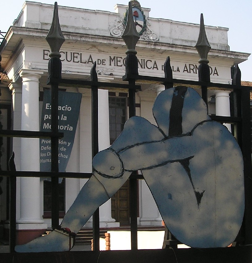 Imagen plastica frente a la ESMA